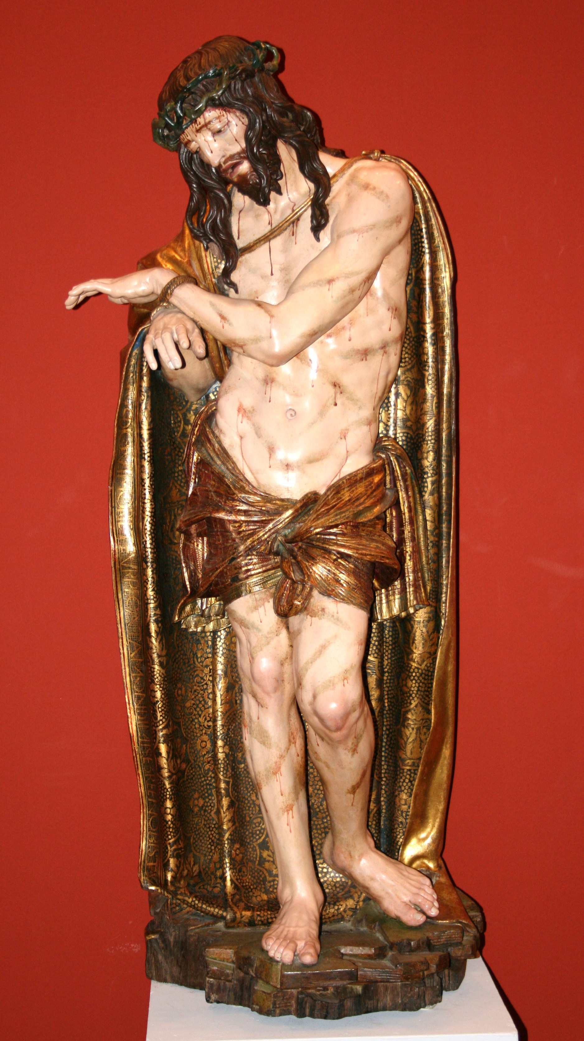 Escultura atribuida a Diego de Siloé en el museo parroquial de Dueñas